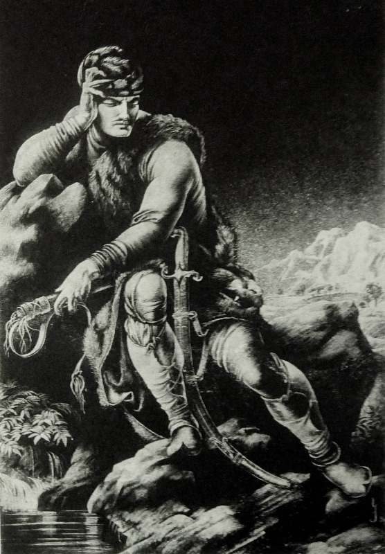 სერგო ქობულაძის ილუსტრაცია, ვეფხისტყაოსანი